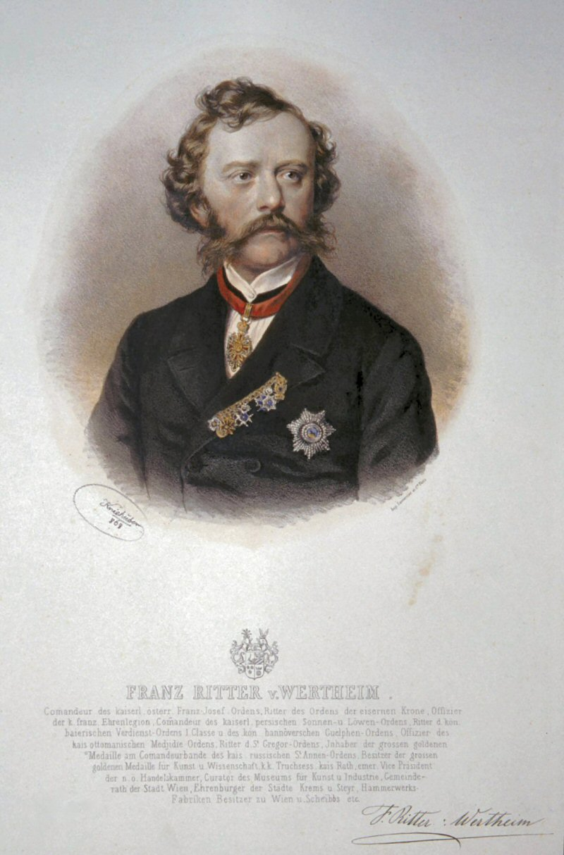 Franz von Wertheim, Lithographie von Josef Kriehuber, 1868